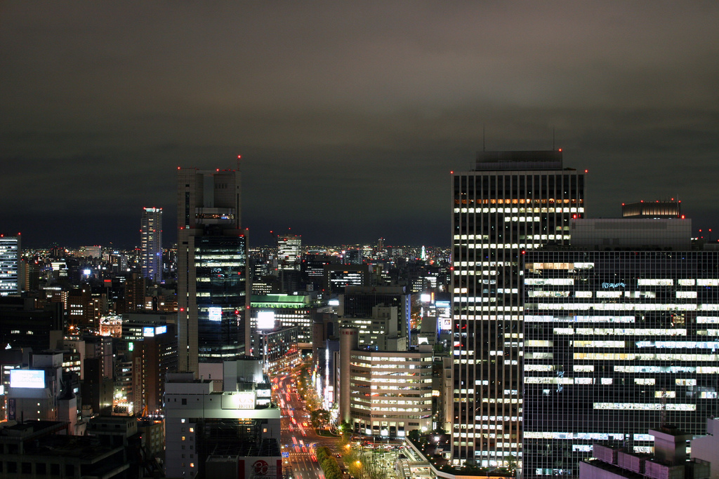 Osaka